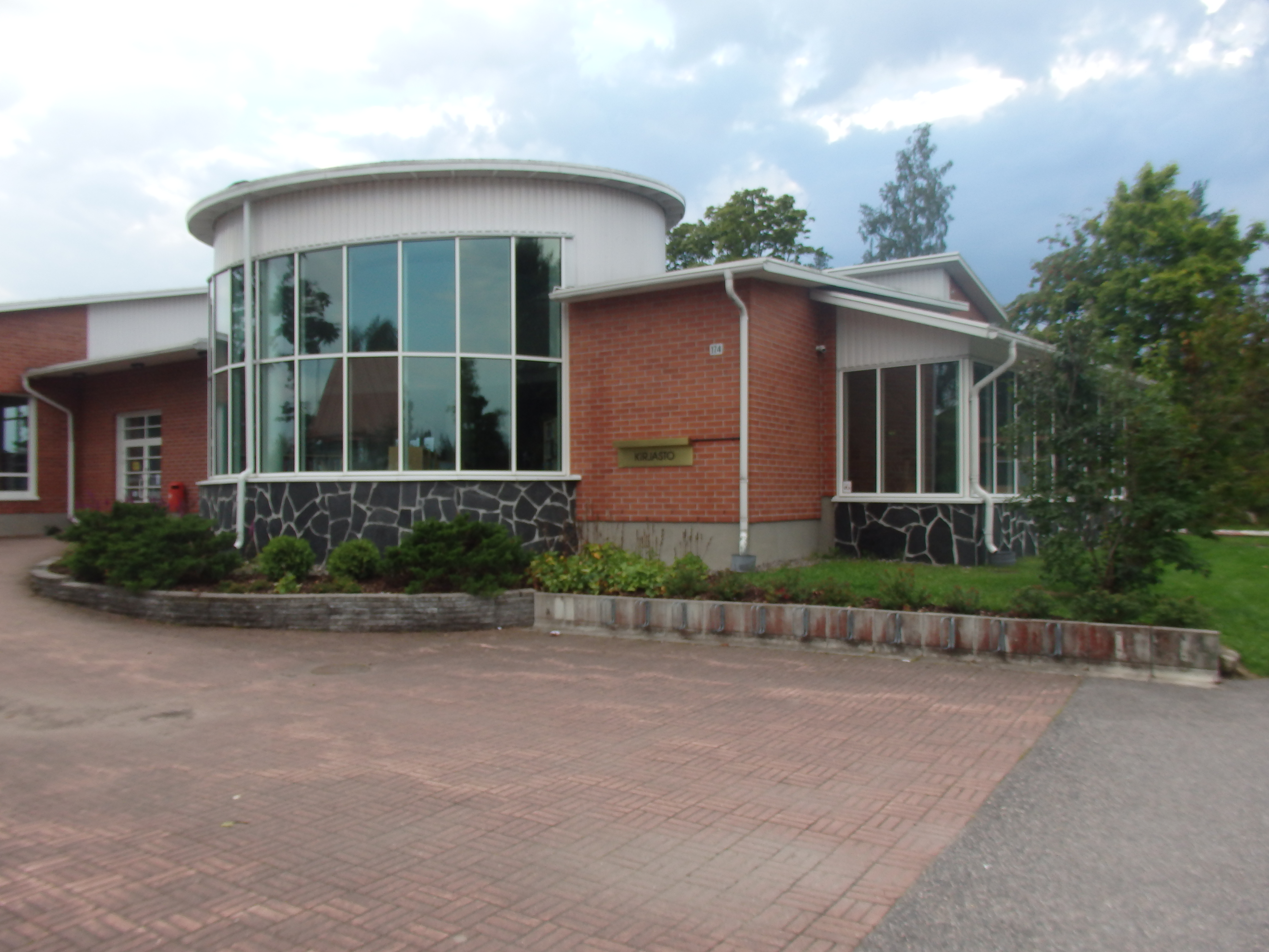 Pornainen